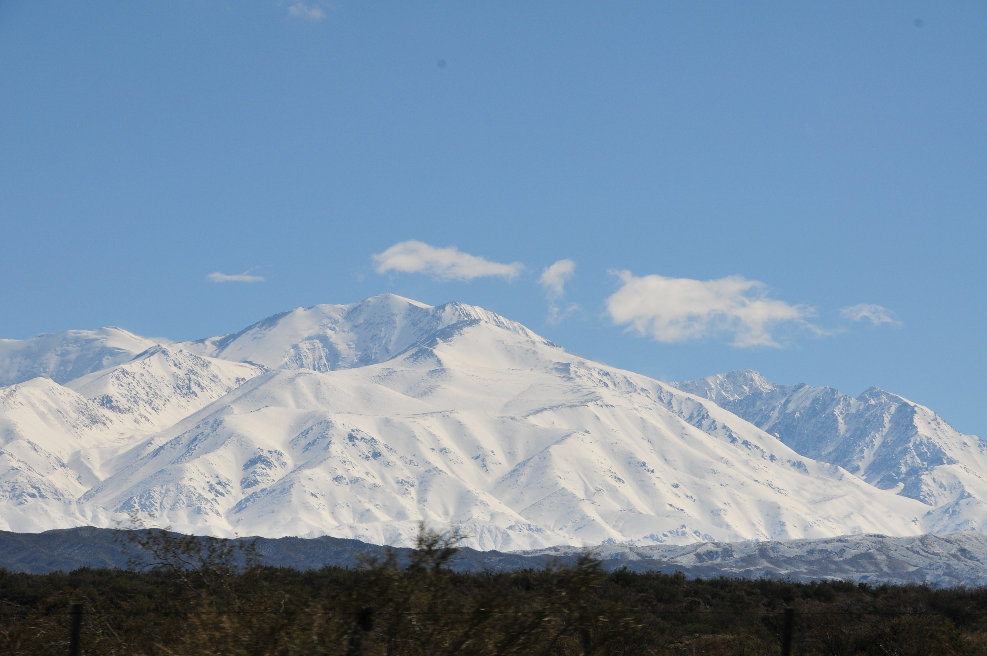 Cerro El Plata visto desde la ciudad de Tunuyán, a 75 km de distancia (orientación sudeste-noroeste).